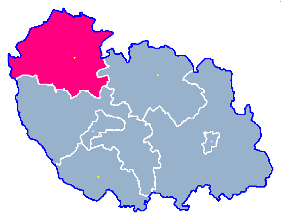 Locator maps for communes in województwo zachodniopomorskie : Sławoborze gm.png (podział na gminy)